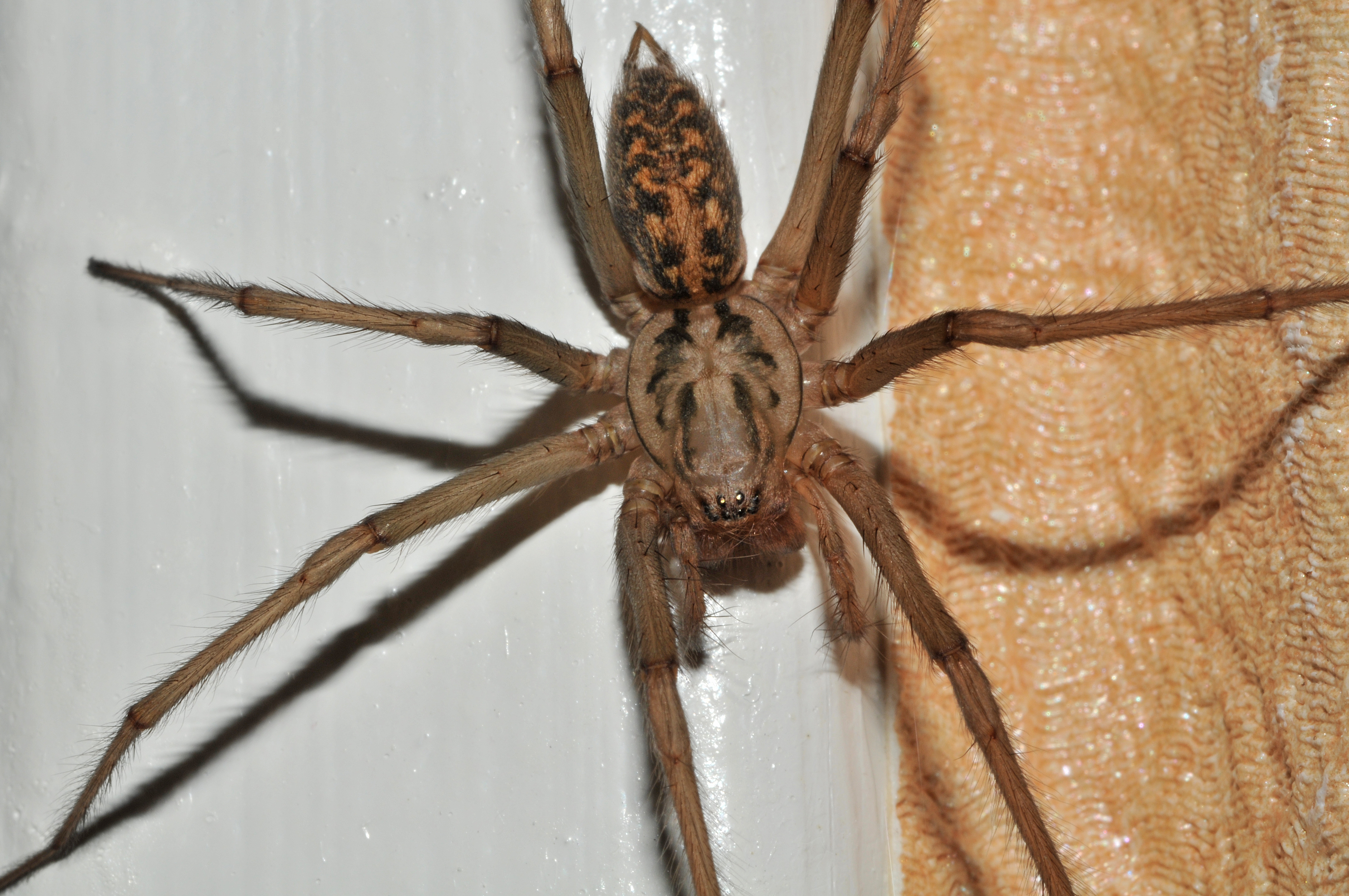 Eratigena atrica (C. L. Koch, 1843)